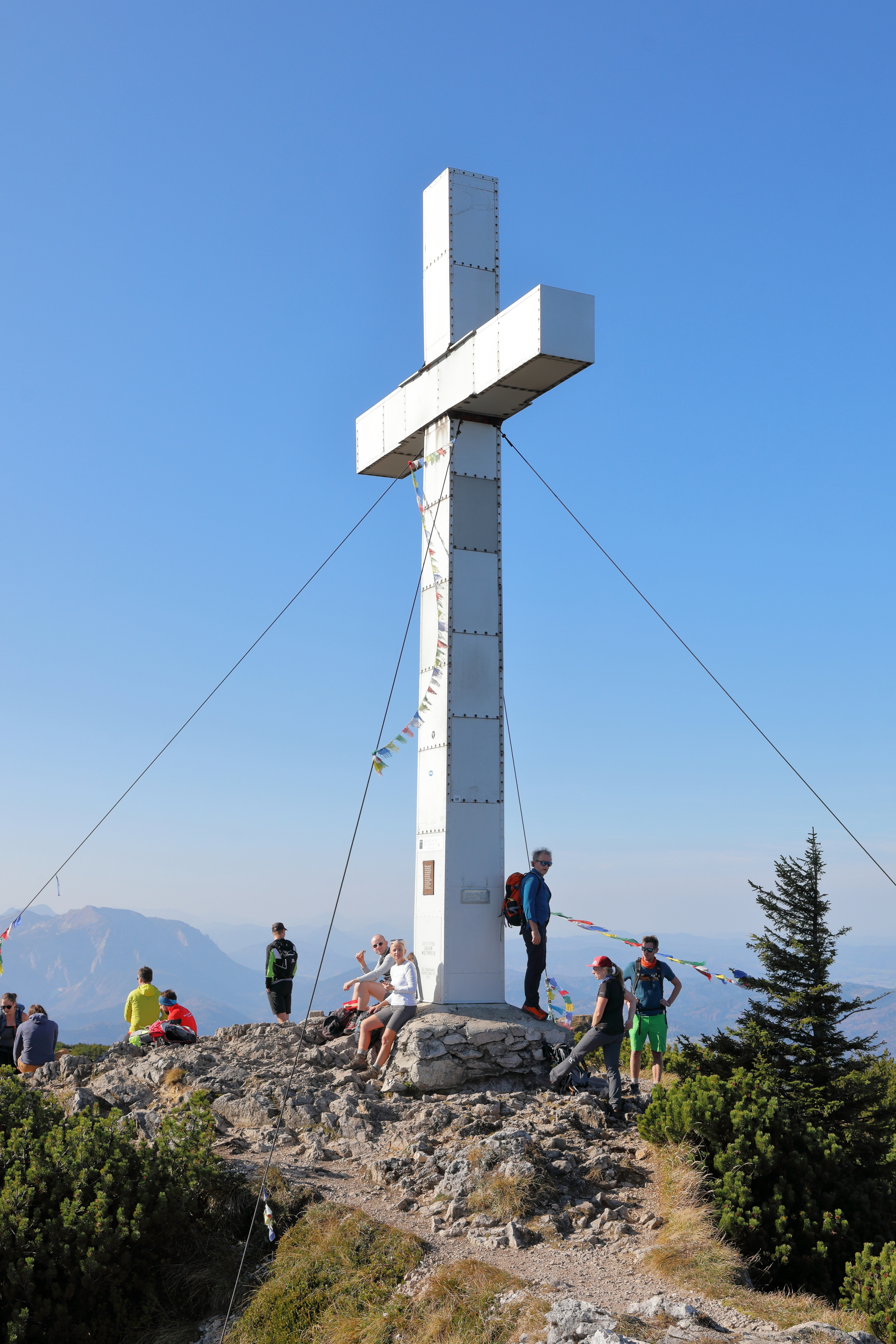 Das Gipfelkreuz auf dem 1691 m hohen Traunstein.Das rund zehn Meter hohe Gipfelkreuz der Kriegsheimkehrer wurde auf dem höchsten Punkt des Traunsteins, dem Pyramidenkogel, 1950 errichtet und am 20. August des gleichen Jahres feierlich geweiht. Es ist den gefallenen Soldaten beider Weltkriege gewidmete.